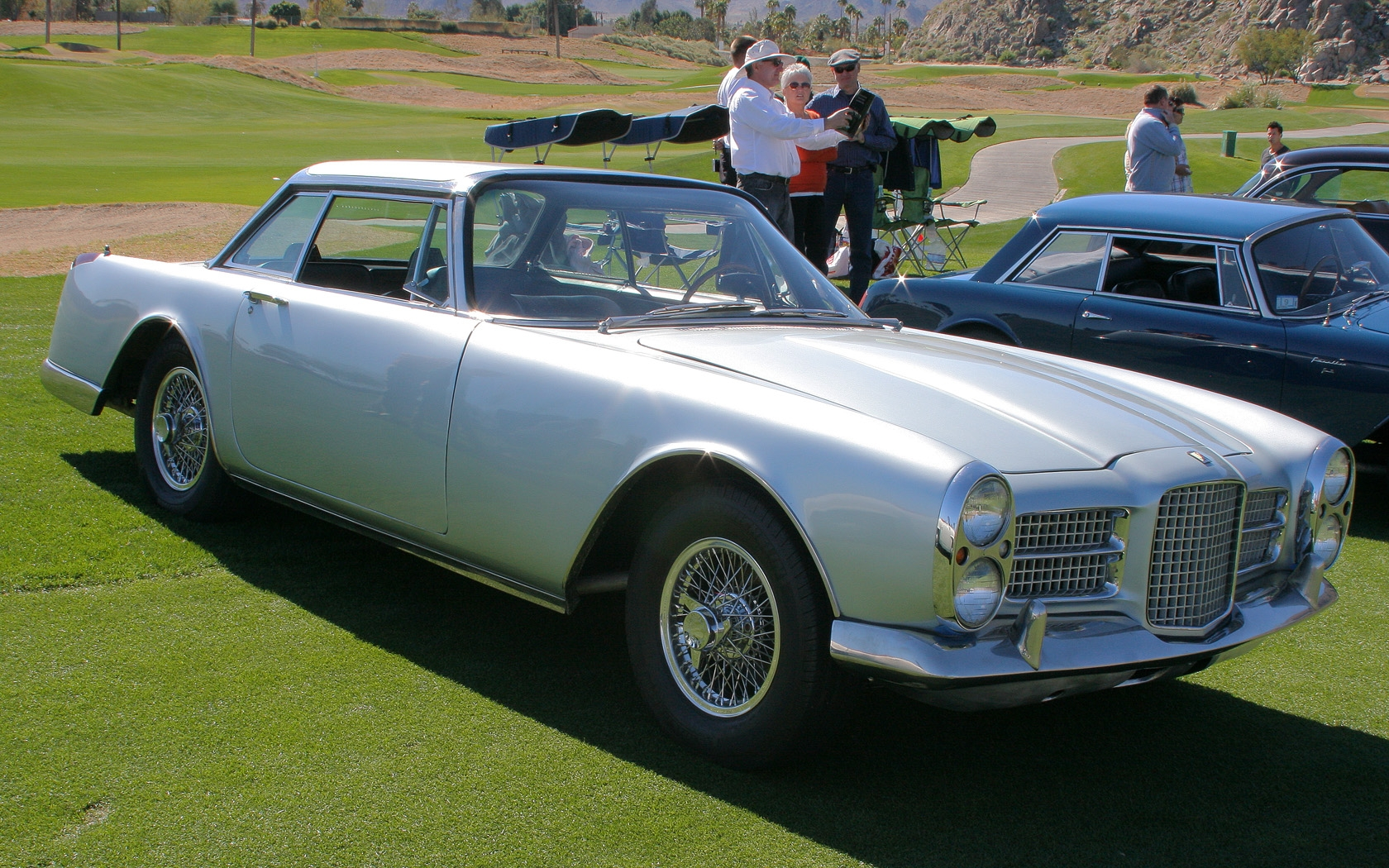 1962 Facel Vega HK2 - fvr